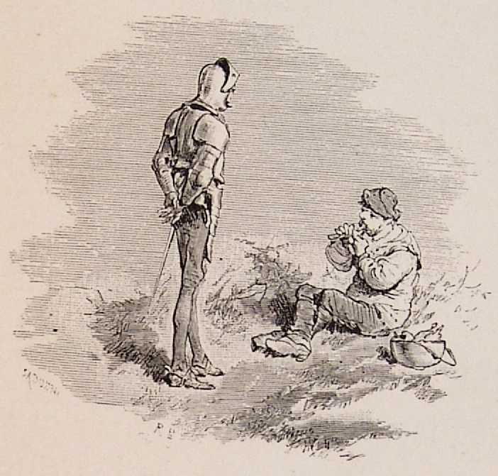 "Don Quixote" — Edición anotada por Nicolás Díaz de Benjumea e ilustrada por Ricardo Balaca (1880-1883). 202_177_quijote_cap20